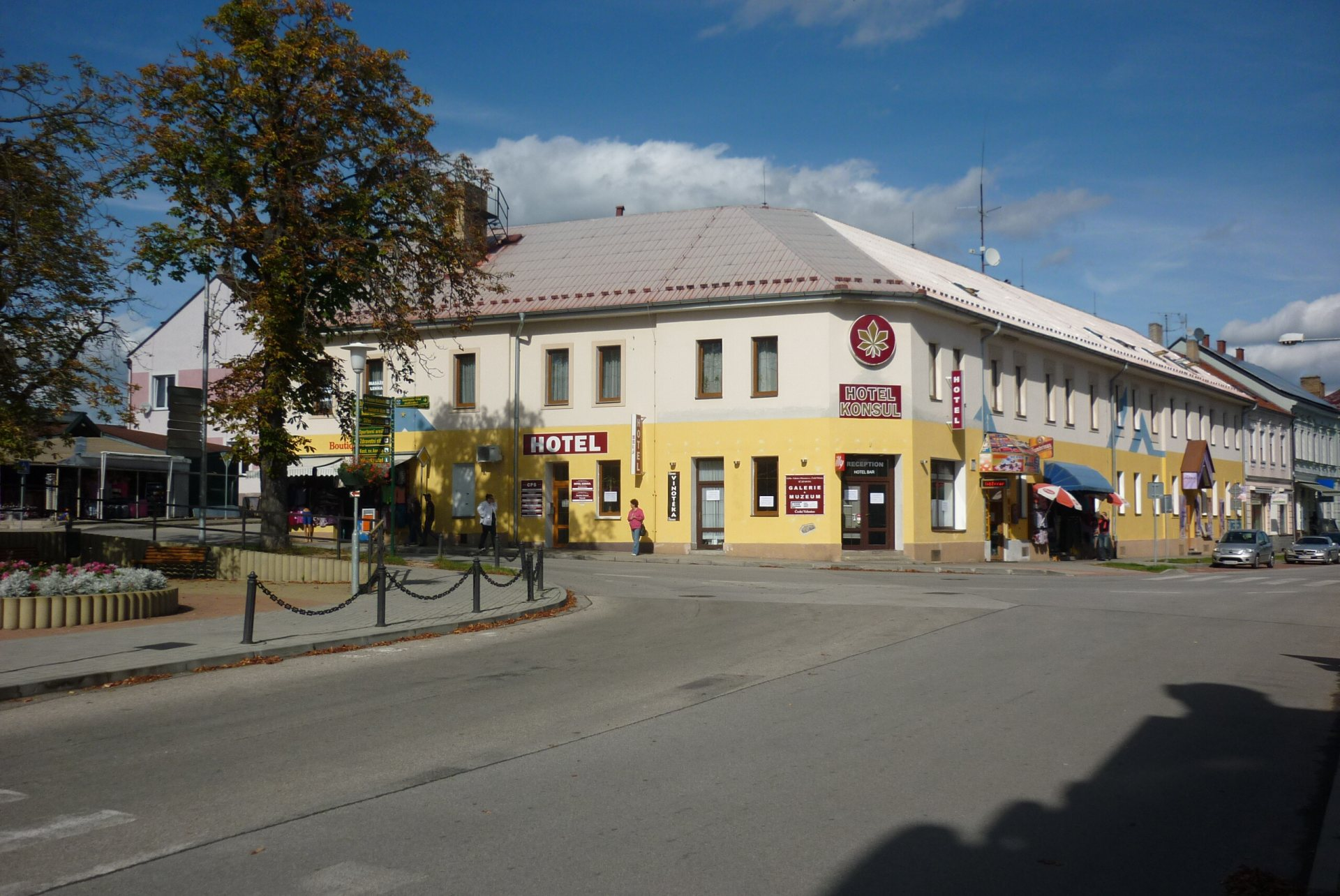 České Velenice, hotel Konsul, třída Čsl. legií 1. Pohled z Vitorazské ulice.